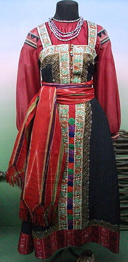 Праздничный костюм однодворки XIX века, Луганский краеведческий музей